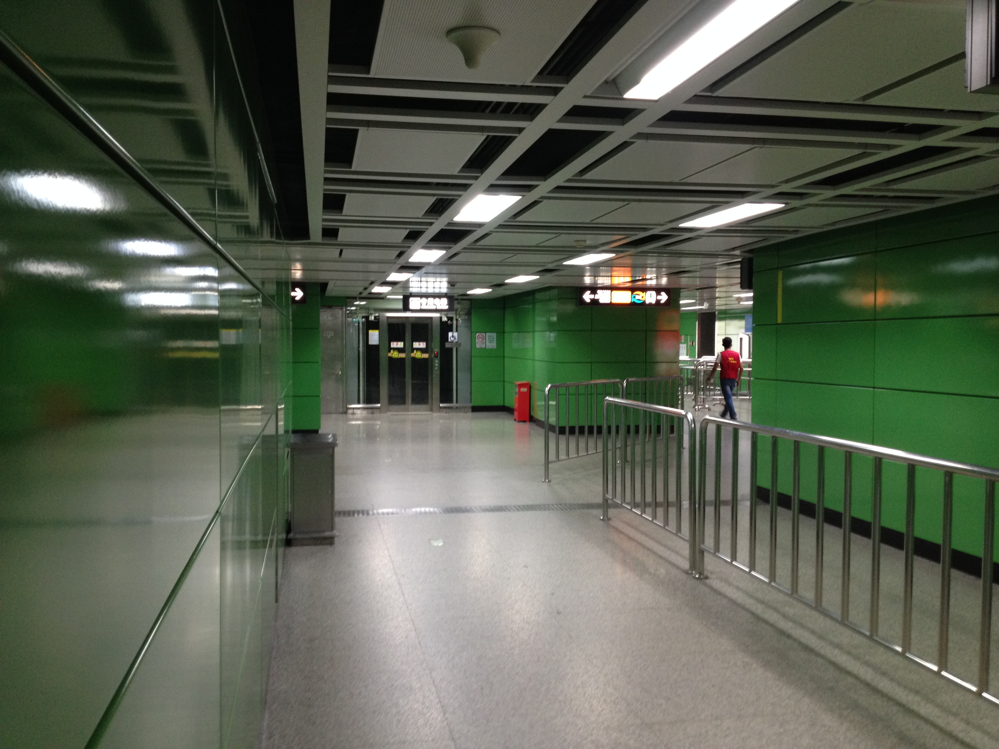 广州地铁客村站换乘平台